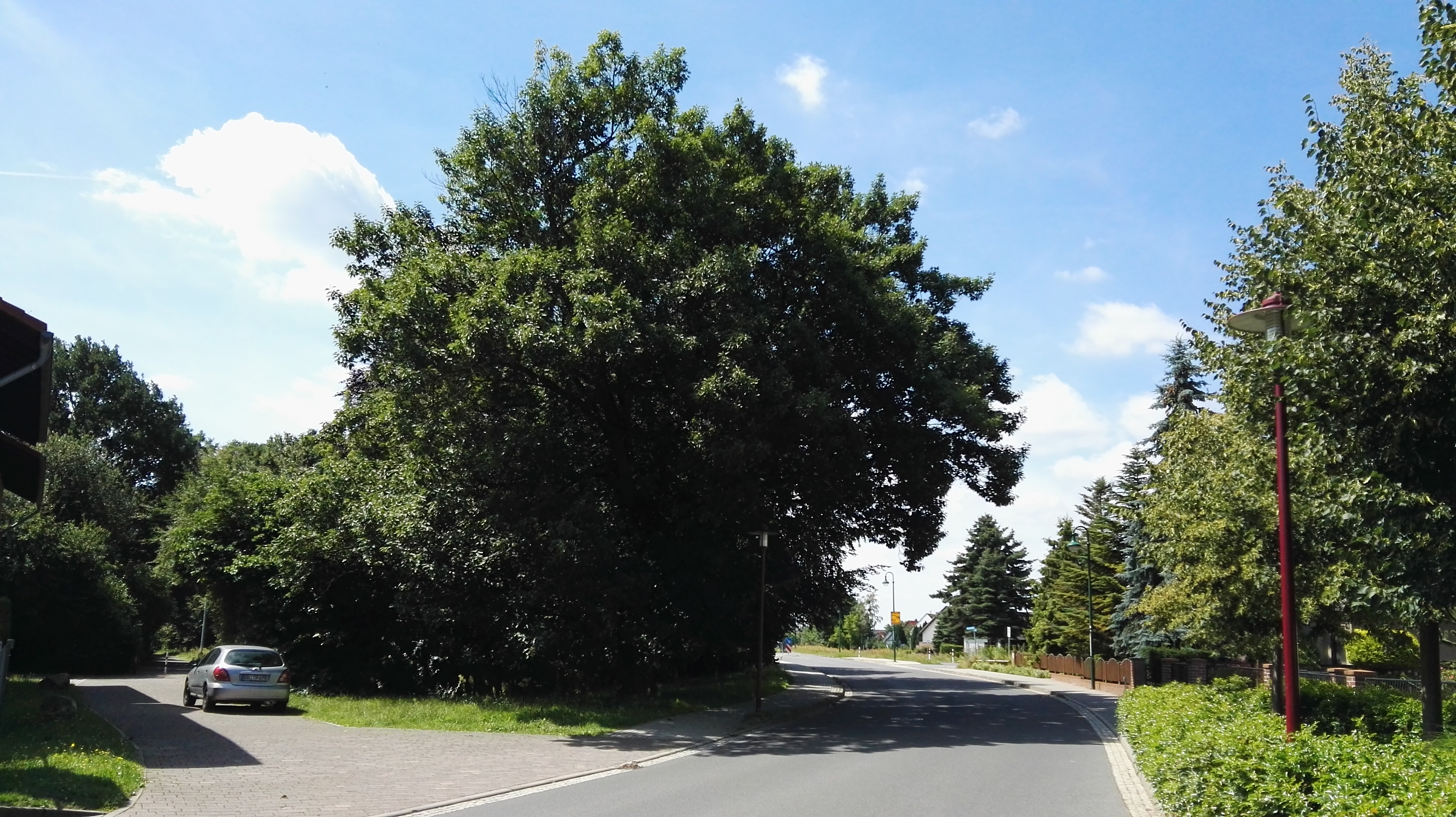 Roteiche in Senftenberg, Einmündung Niemtscher Weg/Hanseatenstraße; Naturdenkmal